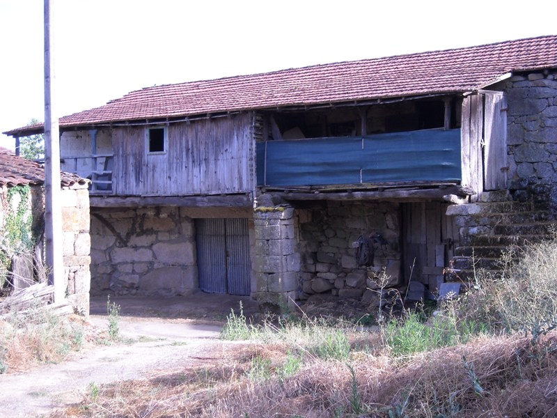 Estevesiños, parroquia de San Mamede de Estevesiños, concello de Monterrei, provincia de Ourense